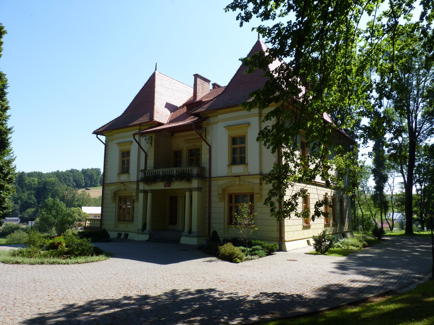 Dwór w izdebkach